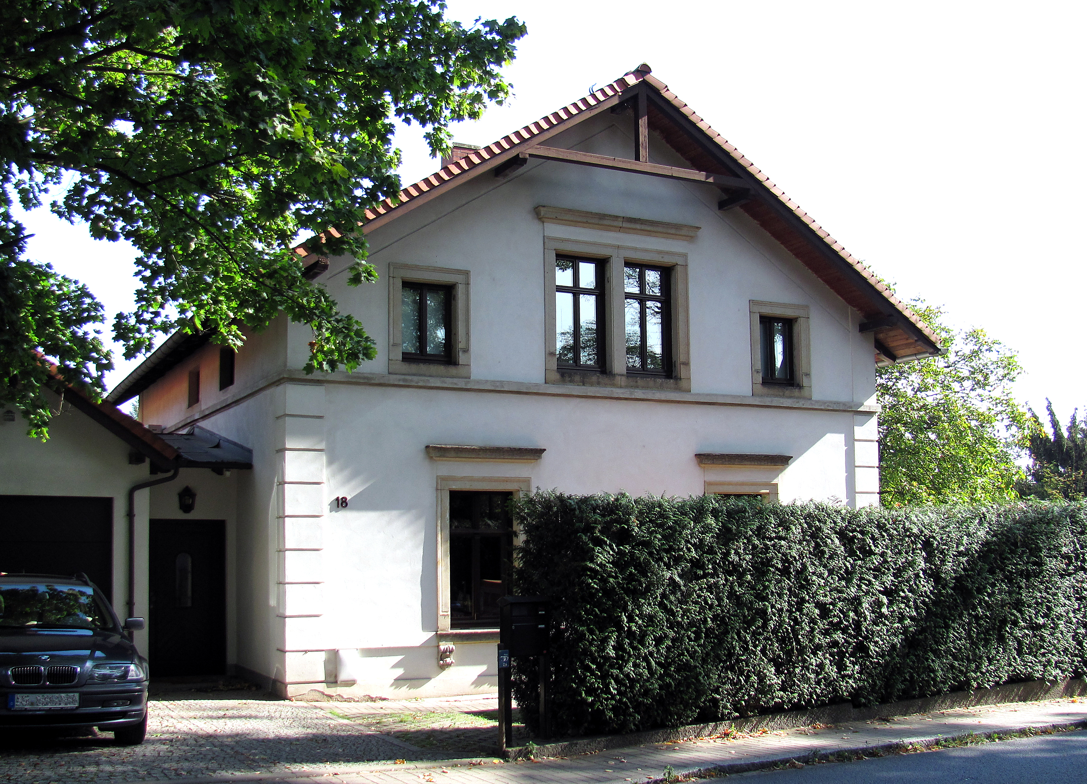 Radebeul, Villa August Ramm. Autokennzeichen wurde auf Bitten der Eigentümer unkenntlich gemacht. Name der Villa laut Bauakte "Ramm".